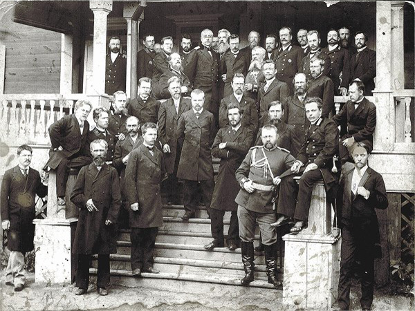 Устроители сельскохозяйственной и кустарно-промысловой выставки, Курган, 1895 год.